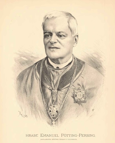 Portréty českých osobností od Jana Vilímka